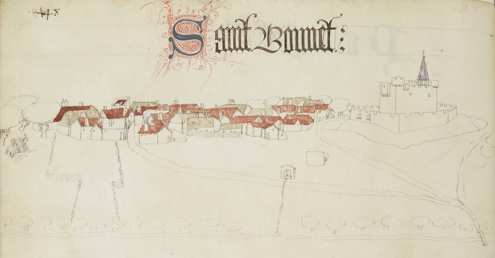 Saint-Bonnet-près-Riom dessinée vers 1450 par Guillaume Revel pour son Armorial d'Auvergne.